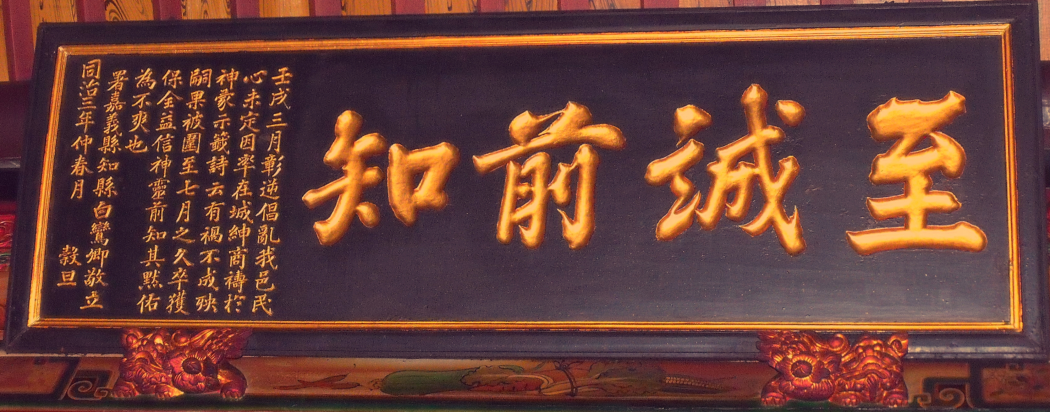 嘉邑城隍廟